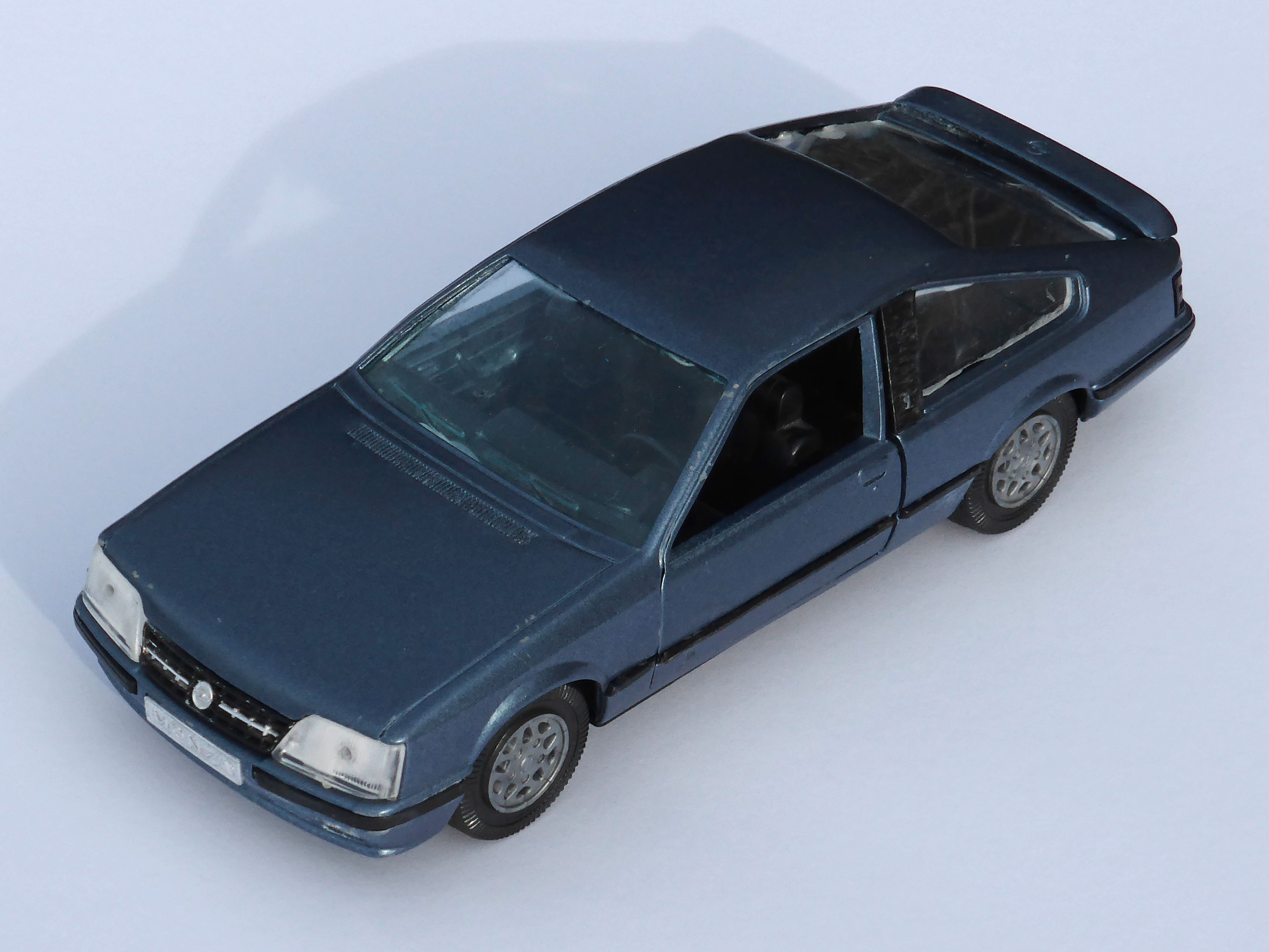 Modellauto "Opel Monza" von GAMA Nr. 448 im Maßstab 1:25 aus den 1980er Jahren.